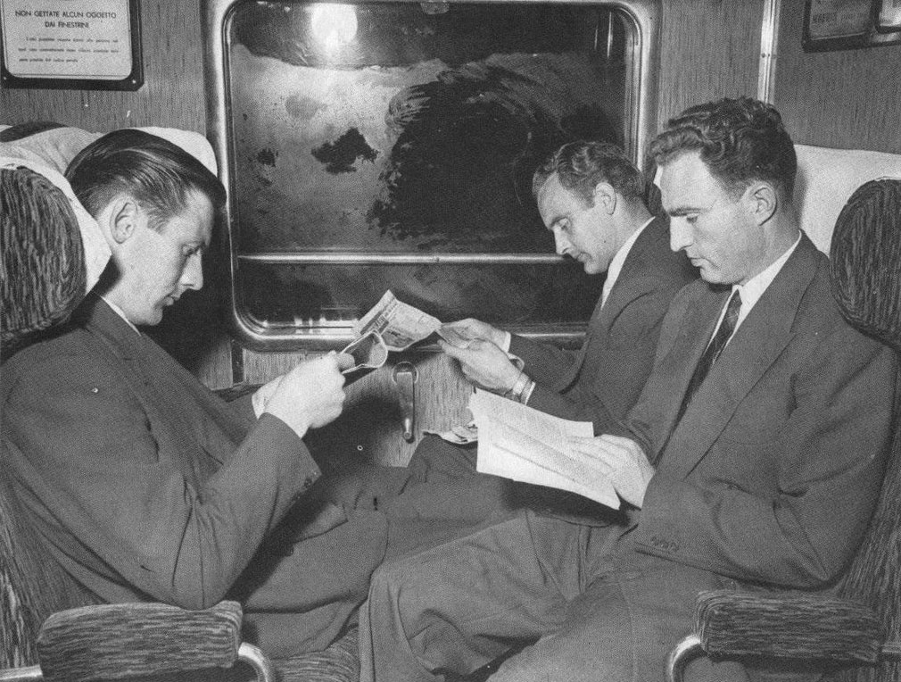 Da sinistra: i calciatori Karl Aage Præst, Karl Aage Hansen e John Hansen, la cosiddetta «pattuglia danese» della Juventus nei primi anni 50 del XX secolo, in un momento di relax durante un trasferimento pre-partita in treno.